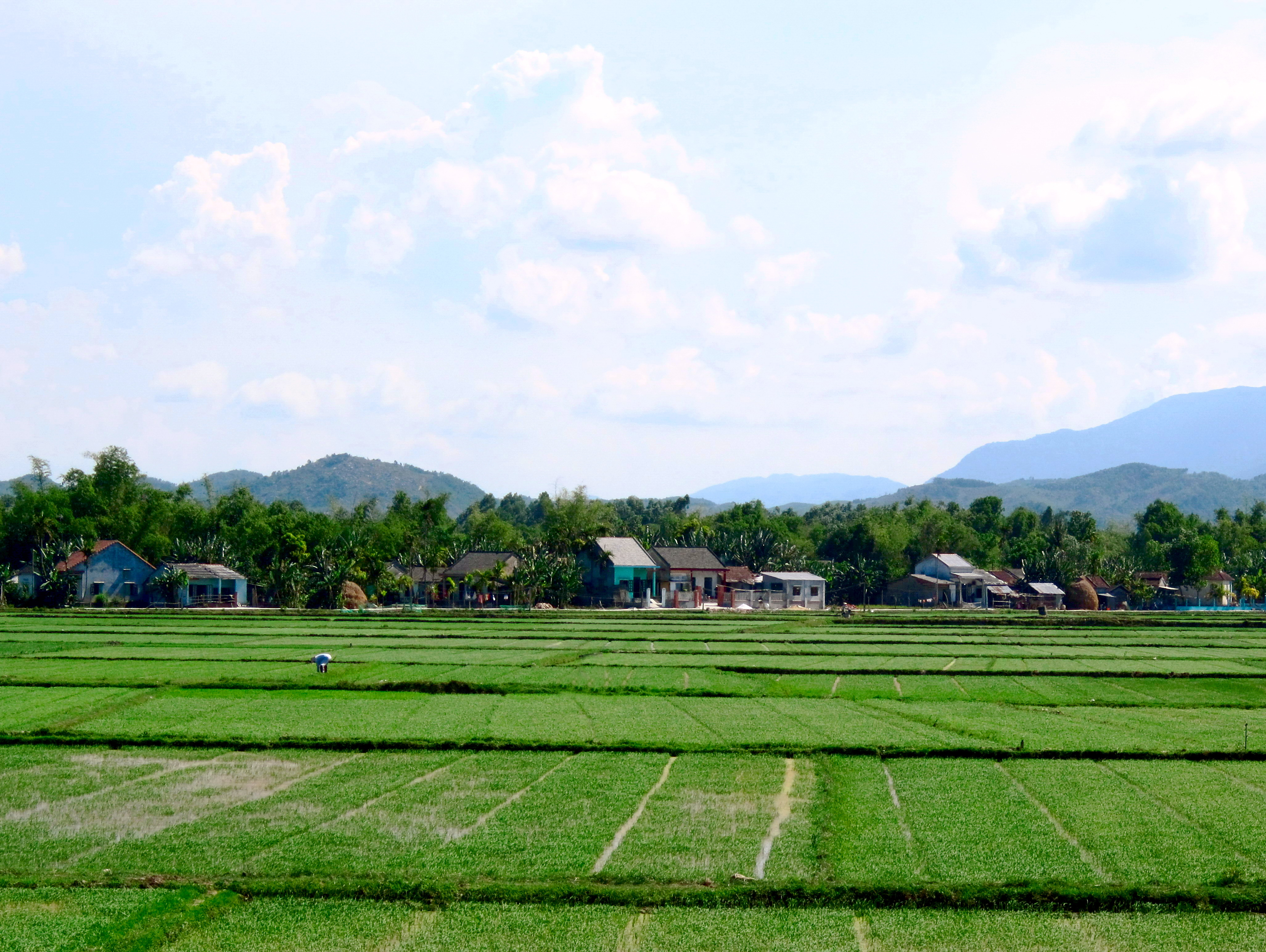 Một cảnh nông thôn ở Quế Phú, thuộc huyện Quế Sơn, tỉnh Quảng Nam, Việt Nam.